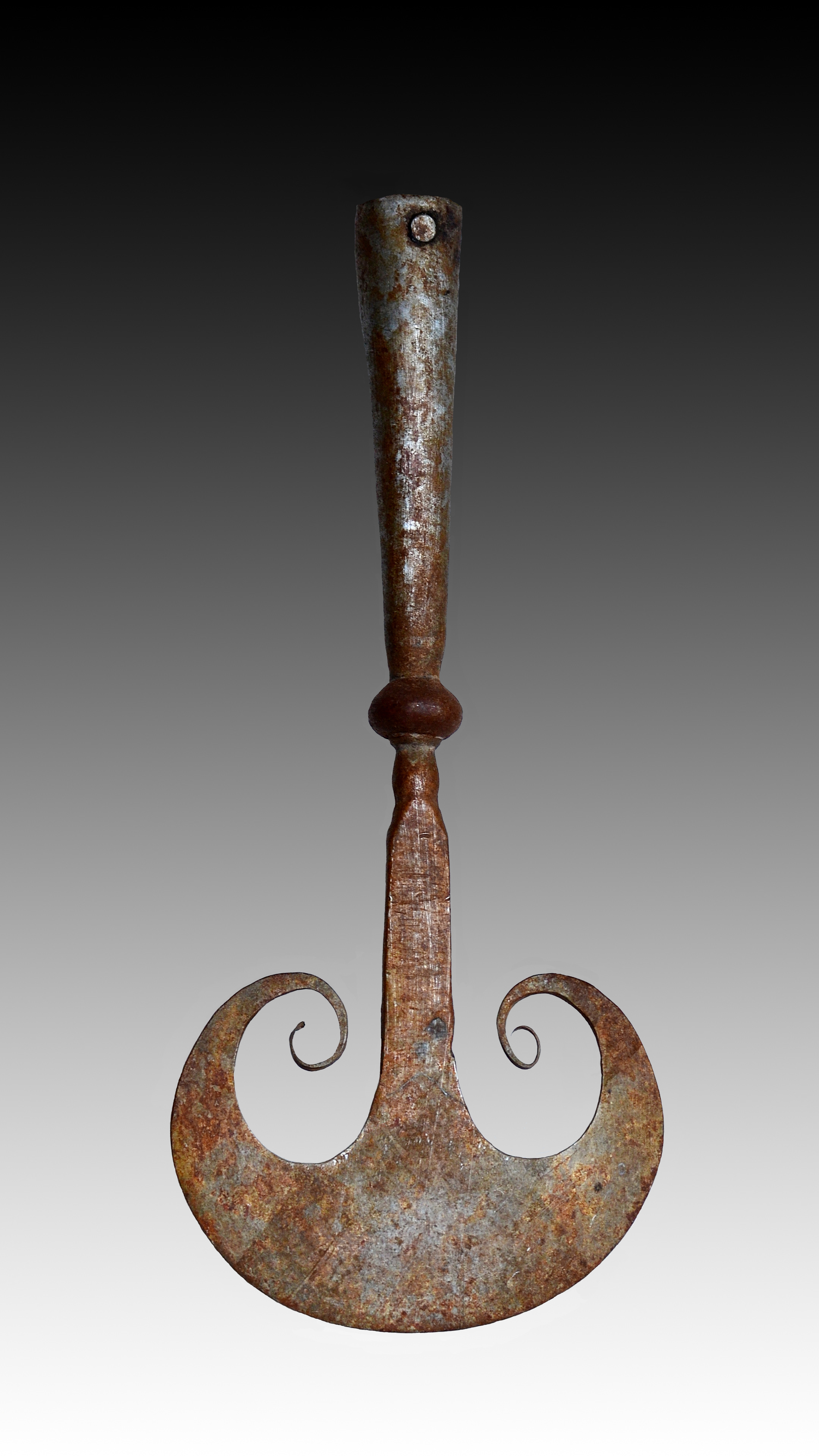 Сечка для рубки капусты. Российская империя.